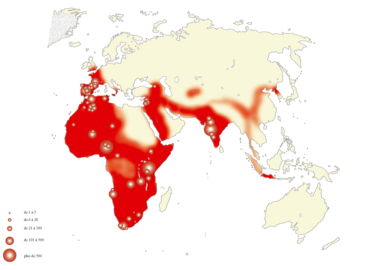 carte de répartition des principaux sites à hachereaux au Pléistocène moyen (Acheuléen) ; Vincent Mourre 2003 (les points indiquent les sites connus et leur diamètre est proportionnel au nombre de hachereaux mis au jour, les zones en rouge sont les régions où des hachereaux sont connus) Mourre, V, Implications culturelles de la technologie des hachereaux. Thèse de Doctorat. Université de Paris X - Nanterre, 3 vol. (2003), (pdf), Fig. 48 (p. 115)